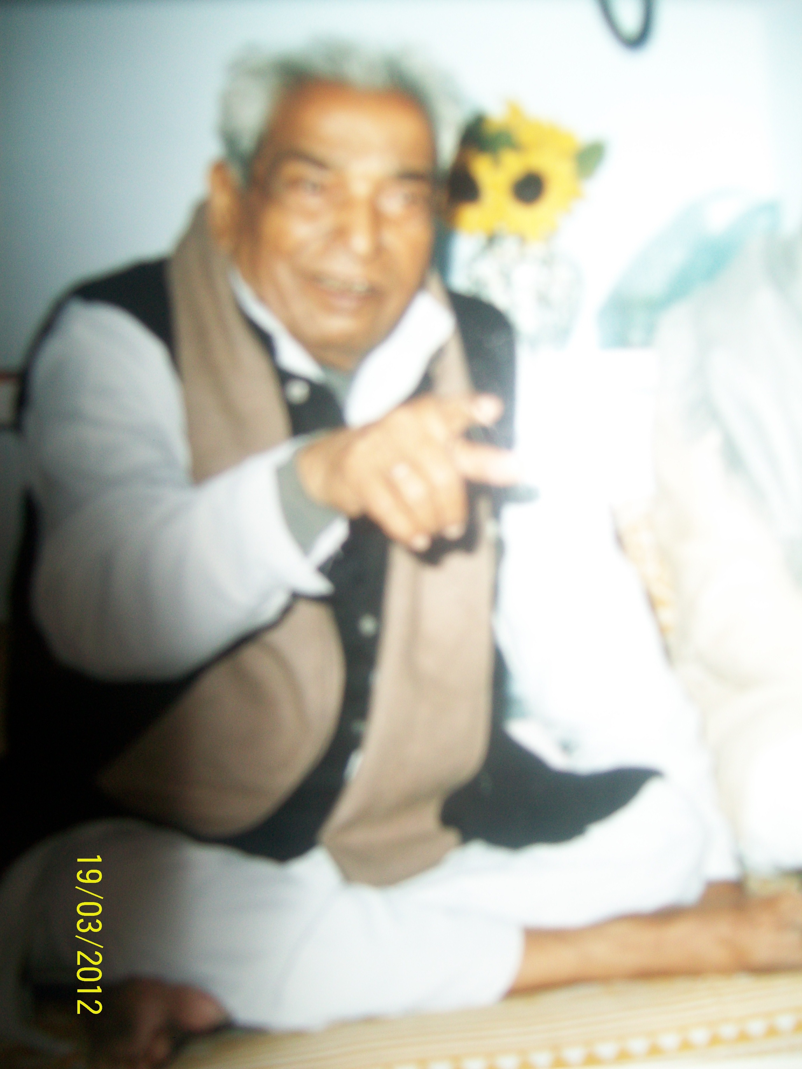 काव्यपाठ करते हुए कवि hi:राजबहादुर 'विकल'